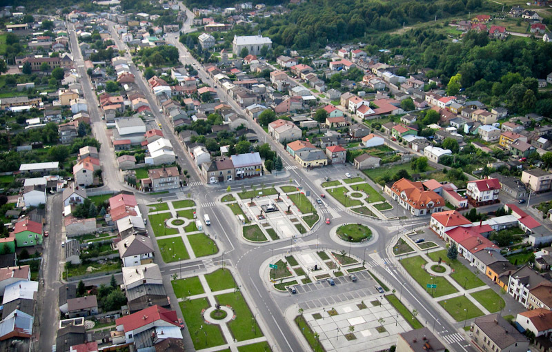 Działoszyn - Plac Wolności z lotu ptaka